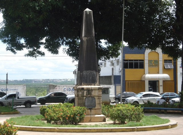 Monumento aos Mártires de 1817 na Praça André de Albuquerque em Natal, Rio Grande do Norte, Brasil.